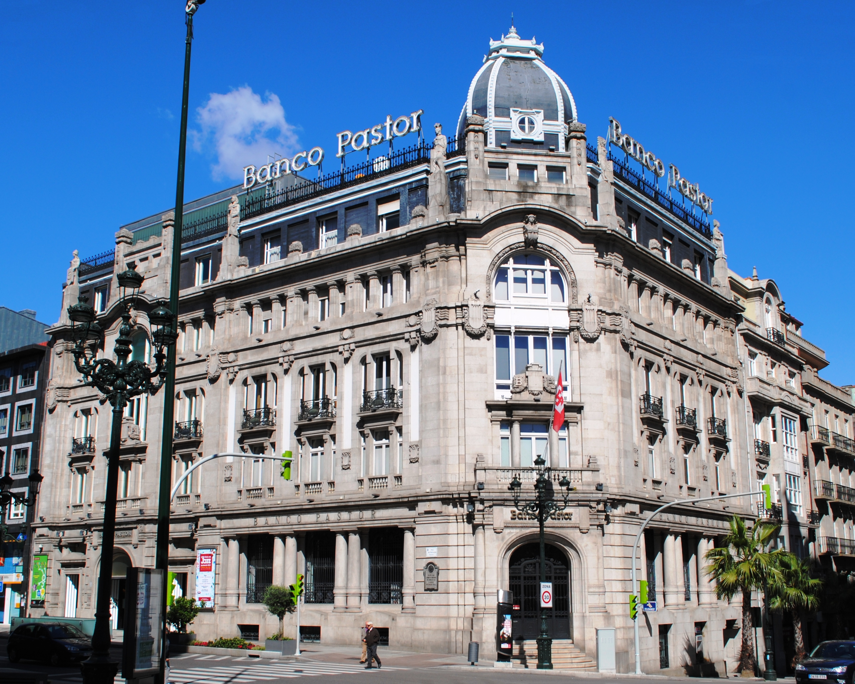 Banco Pastor, Vigo This photograph was processed in GIMP.